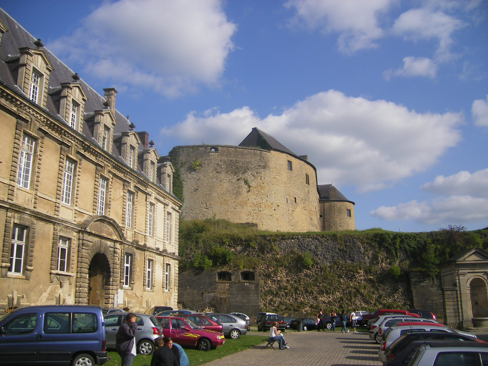 Château bas aussi appelé maison des princes ou du gouvernement de Sedan.